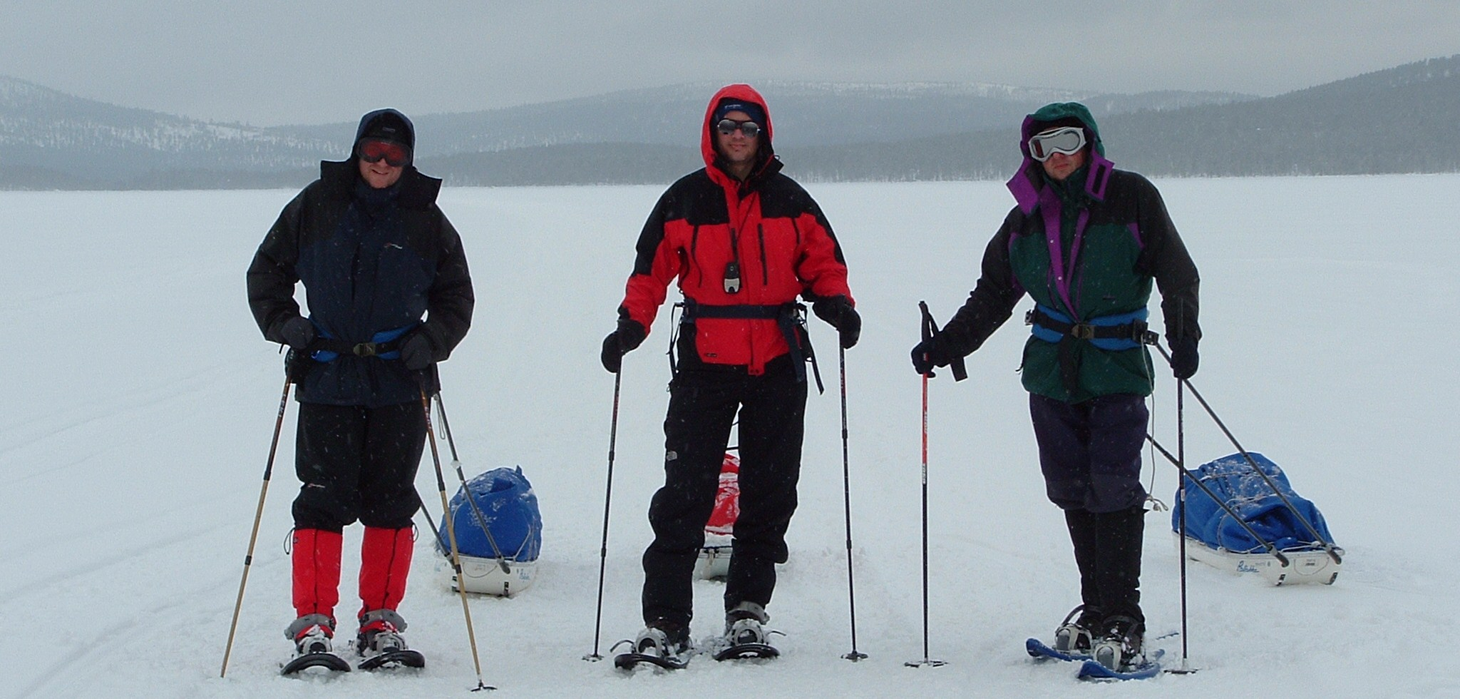 winter hiking in Finland